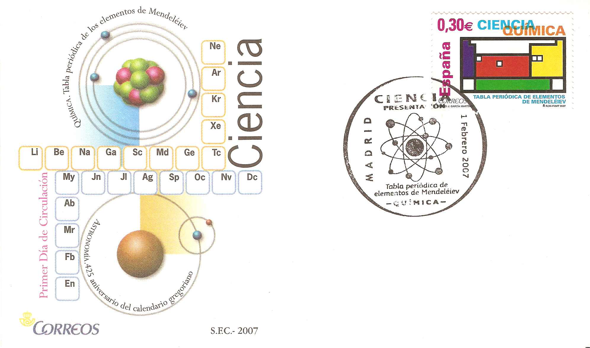 Sobre Primer Día y sello postal en señal de reconocimiento de la contribución de Dmitry Mendeléyev, creador de la Tabla Periódica de Elementos, a la ciencia mundial (España, 1 de febrero de 2011).